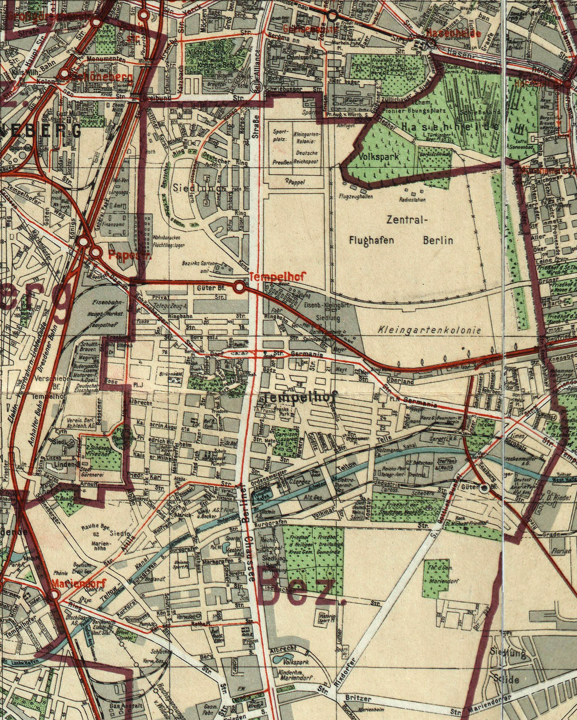 Ausschnitt aus Silva-Übersichtsplan von der Stadt Berlin und ihren 20 Verwaltungsbezirken : auf Grund des Gesetzes vom 27. April 1920 / bearb. und hrsg. von Willy Holz Format: ca 163 x 117 cm Orientierung: Nord Maßstab: 1: 30 000 (Innenstadt 1: 20 000) 2 Blätter, mehrfarbig